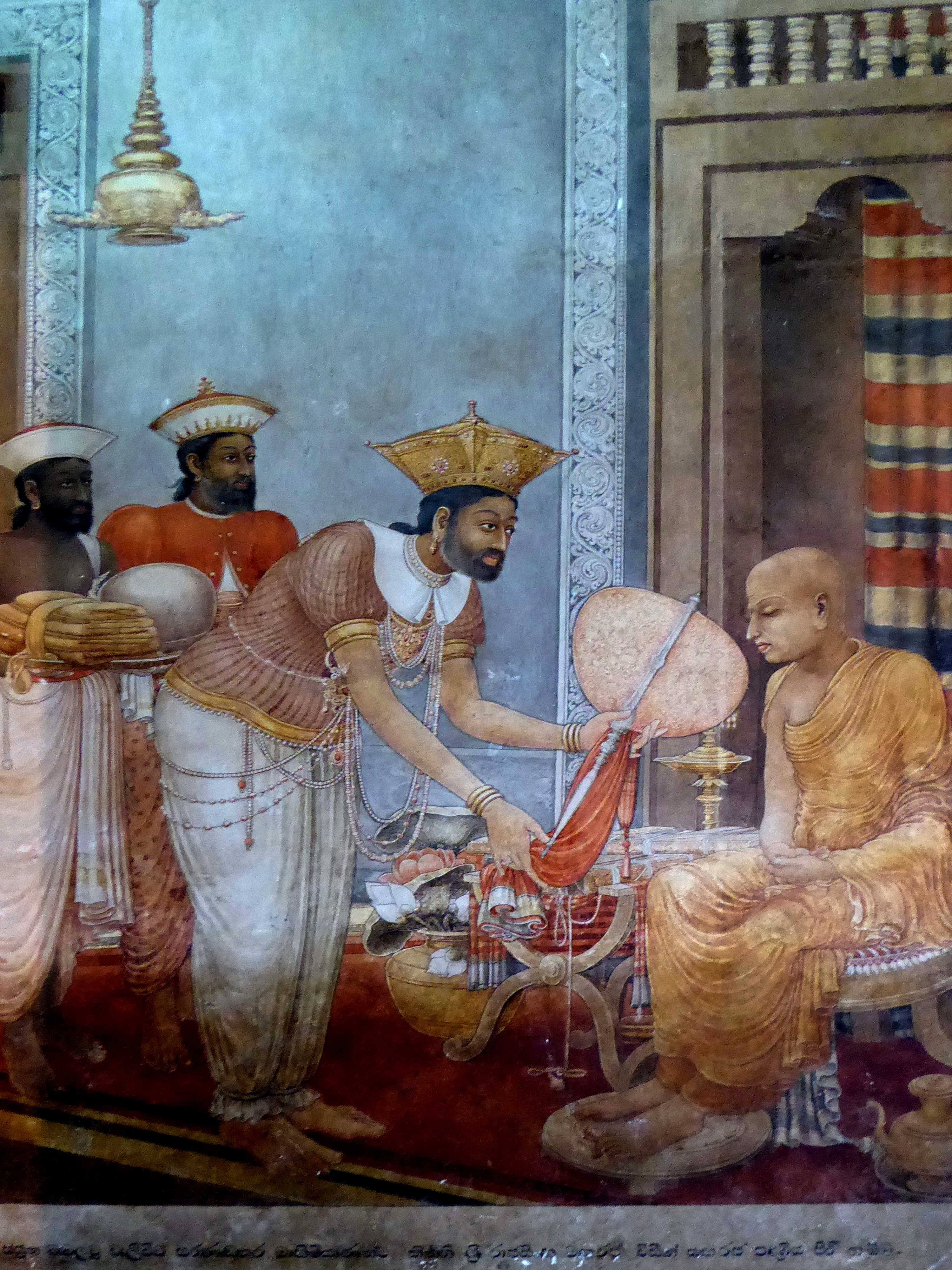 118 King Rajasingha makes Ven Saranankara Sangharaja, Kelaniya Raja Maha Vihara